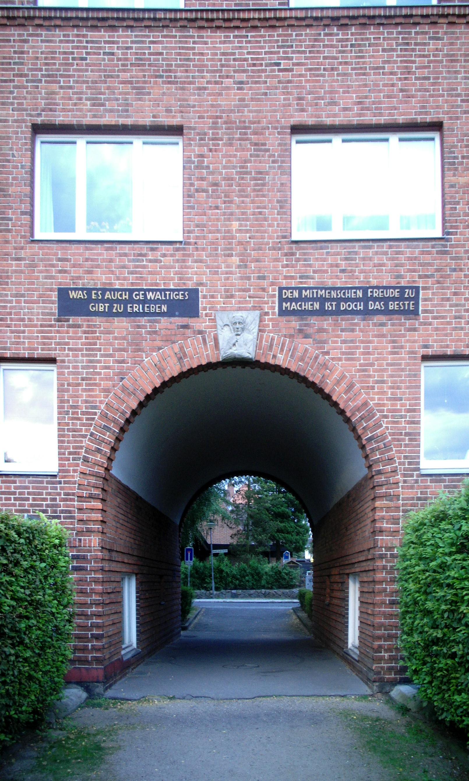 Das Tor der Hoffnung in Lübeck, Tordurchgang auf der Wakenitzseite